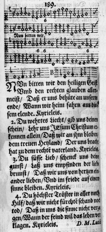 Nun bitten wir den Heiligen Geist (1653), Melodie mit beziffertem Bass und Text